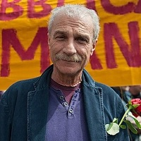 Sandro Medici durante una manifestazione in favore della sua lista.